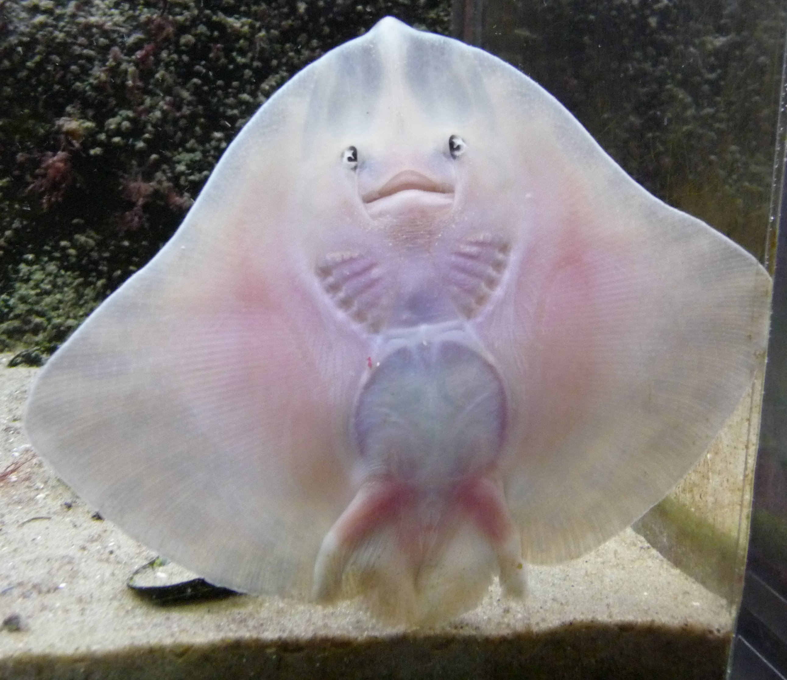 Unterseite eines Sternrochens